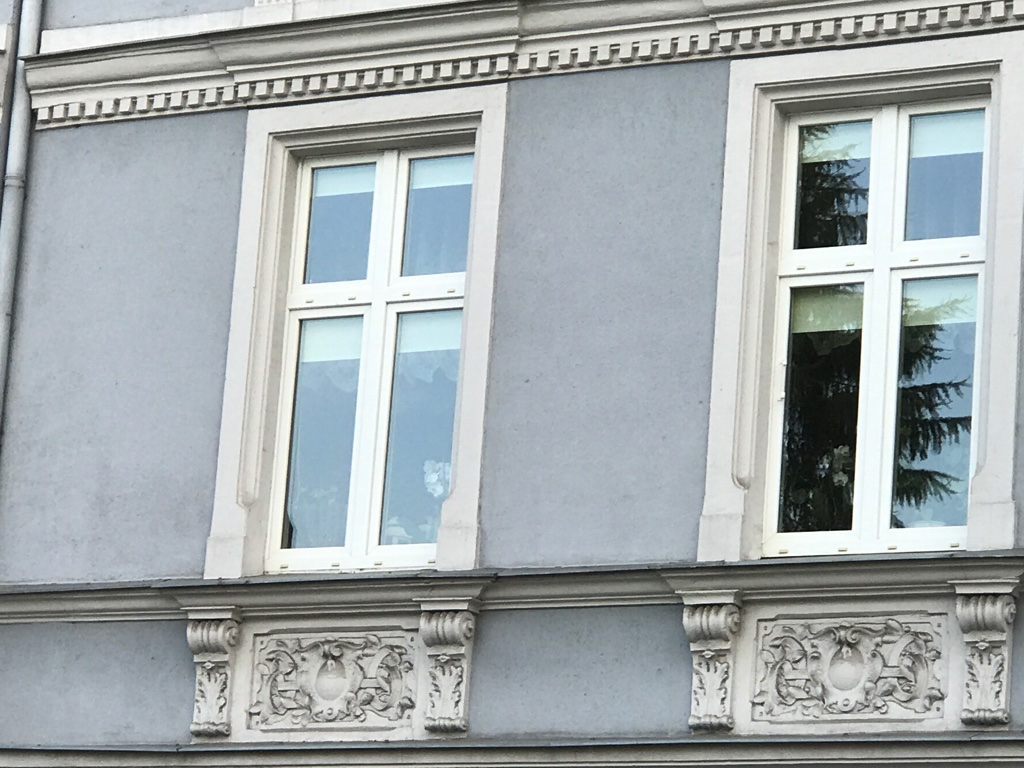 Kamienica przy ul Wojska Polskiego 15